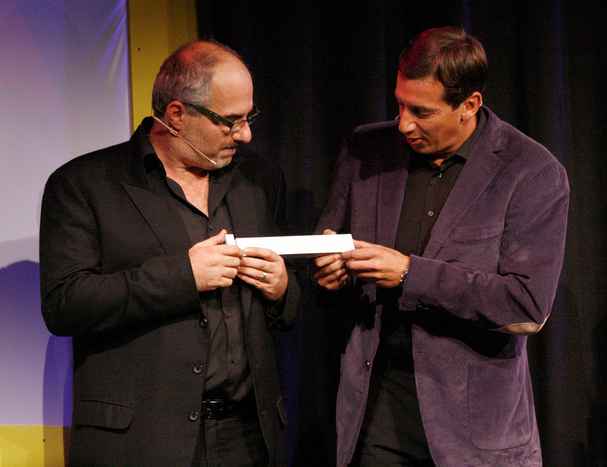 Michael Niavarani und Viktor Gernot bei der Verleihung des Österreichischen Kabarettpreises 2010 im Vindobona in Wien.